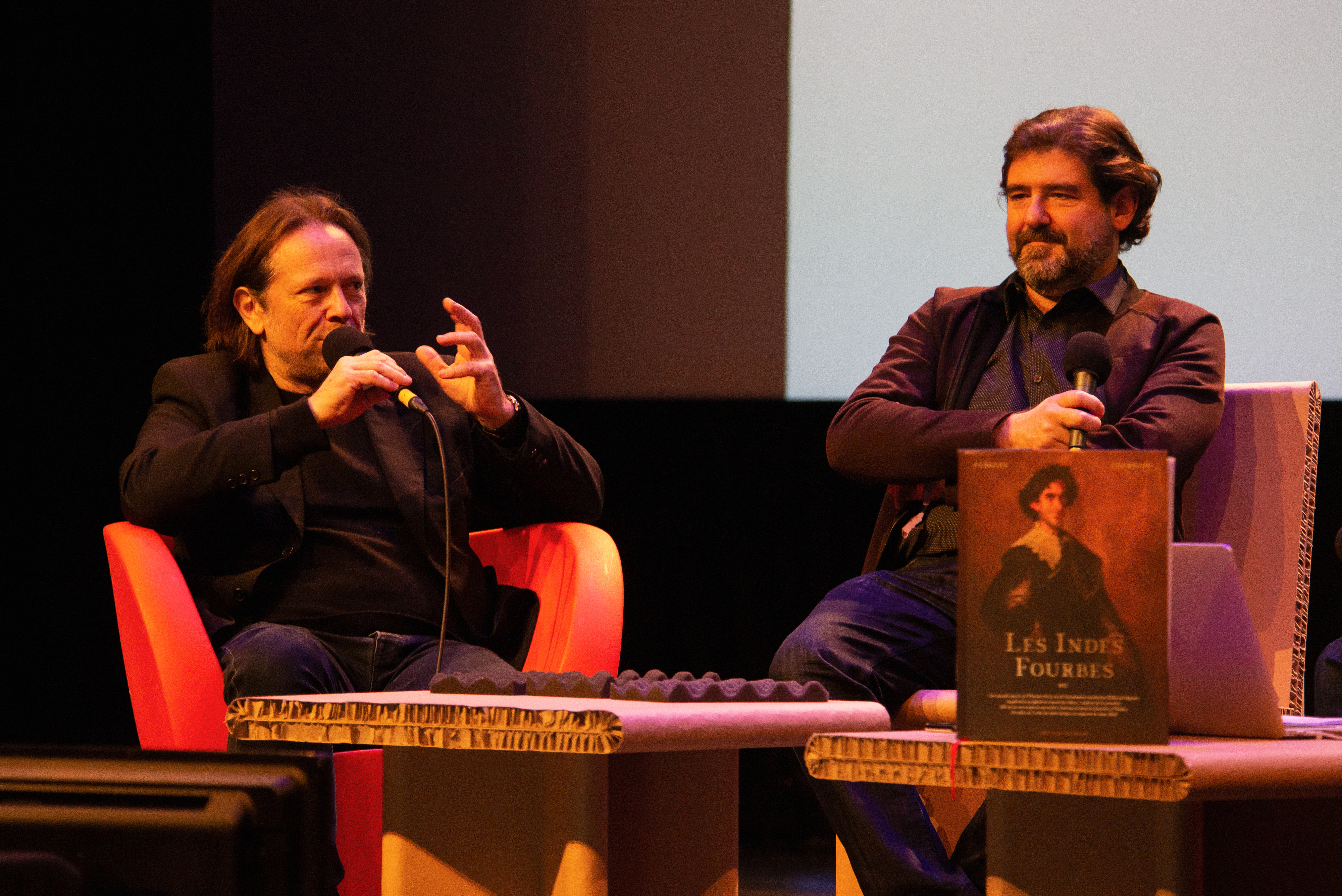 Alain Ayroles et Juanjo Guarnido, auteurs des Indes fourbes - Festival International de la Bande Dessinée d'Angoulême 2020.